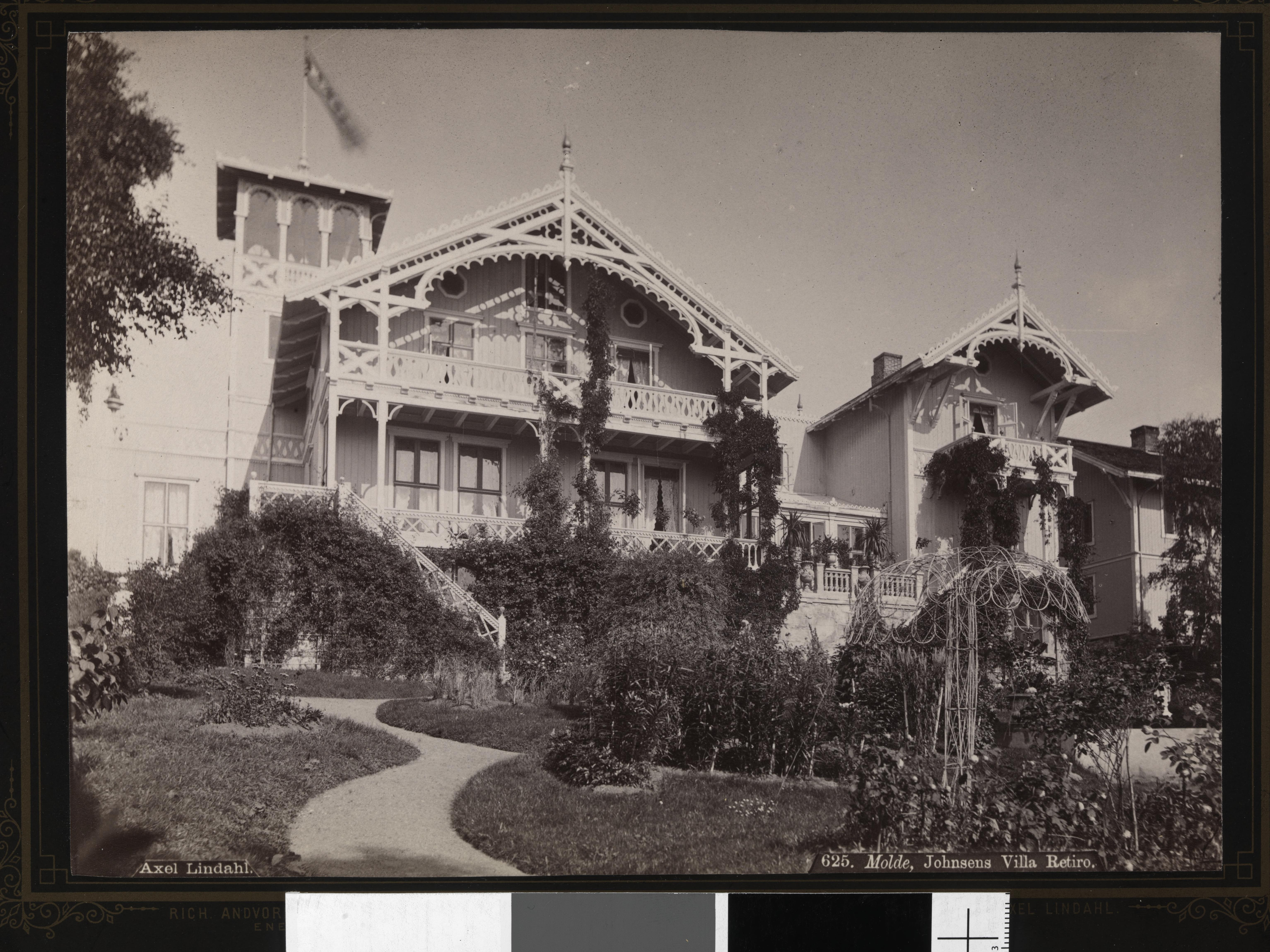 Bildet er hentet fra Nasjonalbibliotekets bildesamling Villa Retiro, Molde, Møre og Romsdal